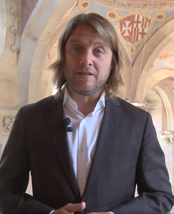 Olga Viza i David Escudé, jurats de l'11a edició del Concurs de Relats Curts Online de TMB